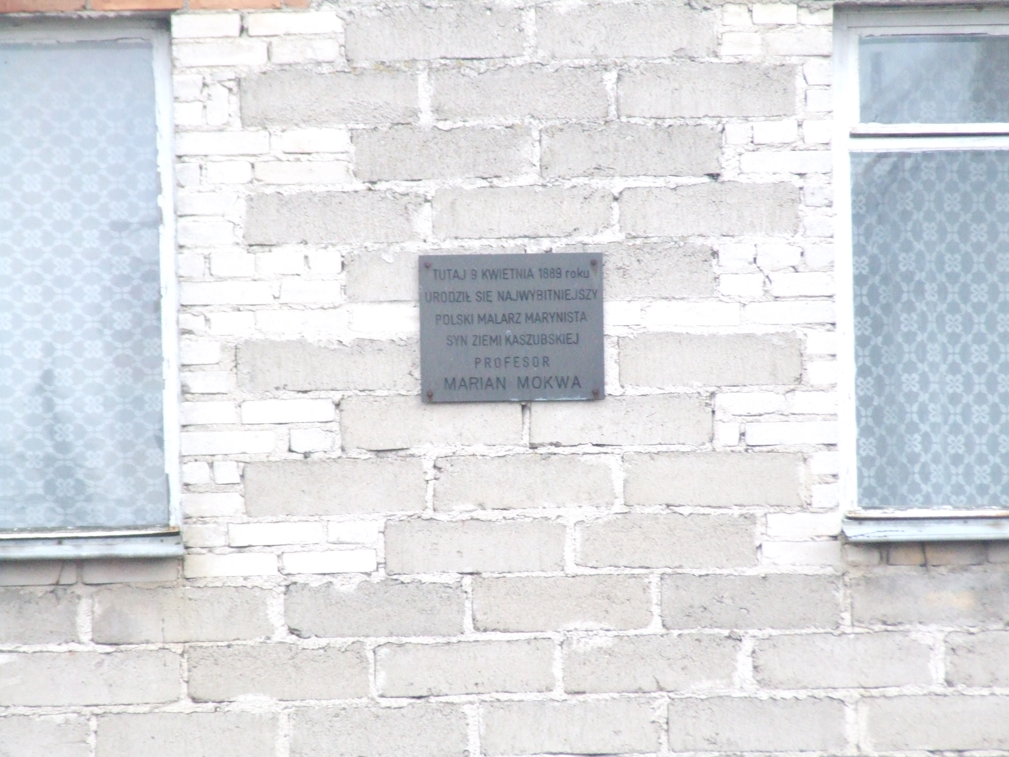 Malary